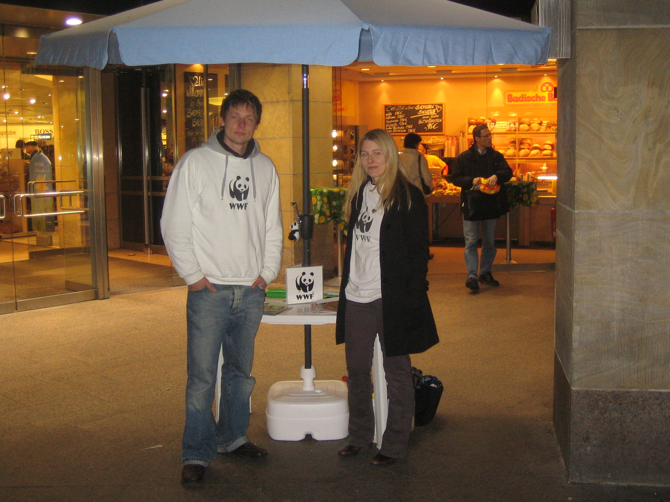 WWF-Infostand in Karlsruhe